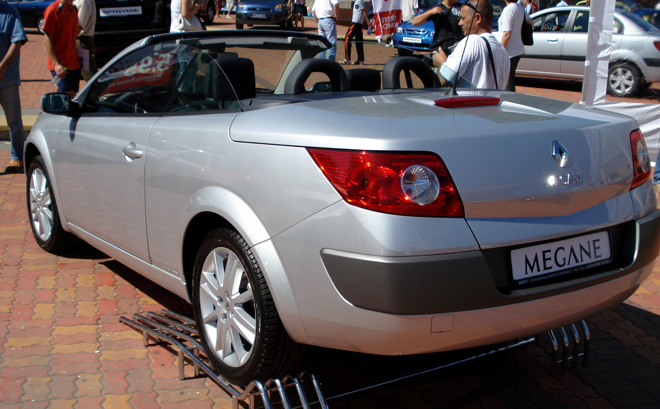 Back of 2006 Renault Megane Cabrio taken in Piteşti, Romania